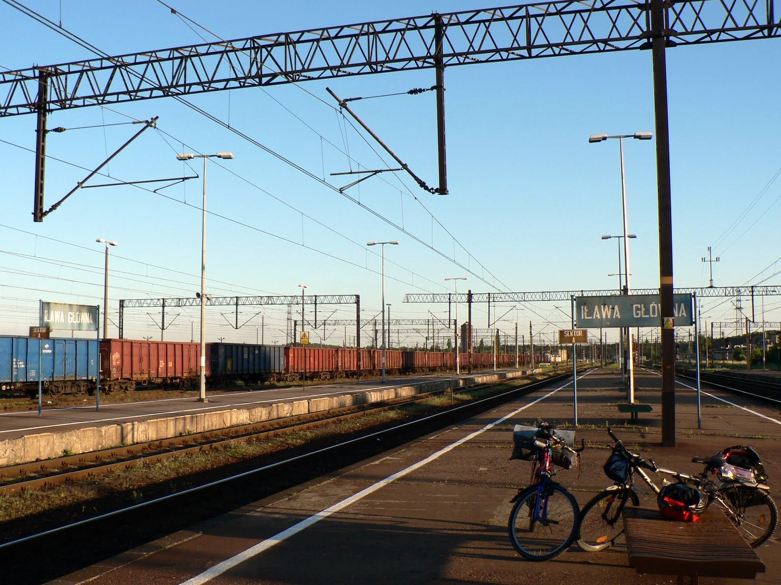 Dworzec Iława Główna